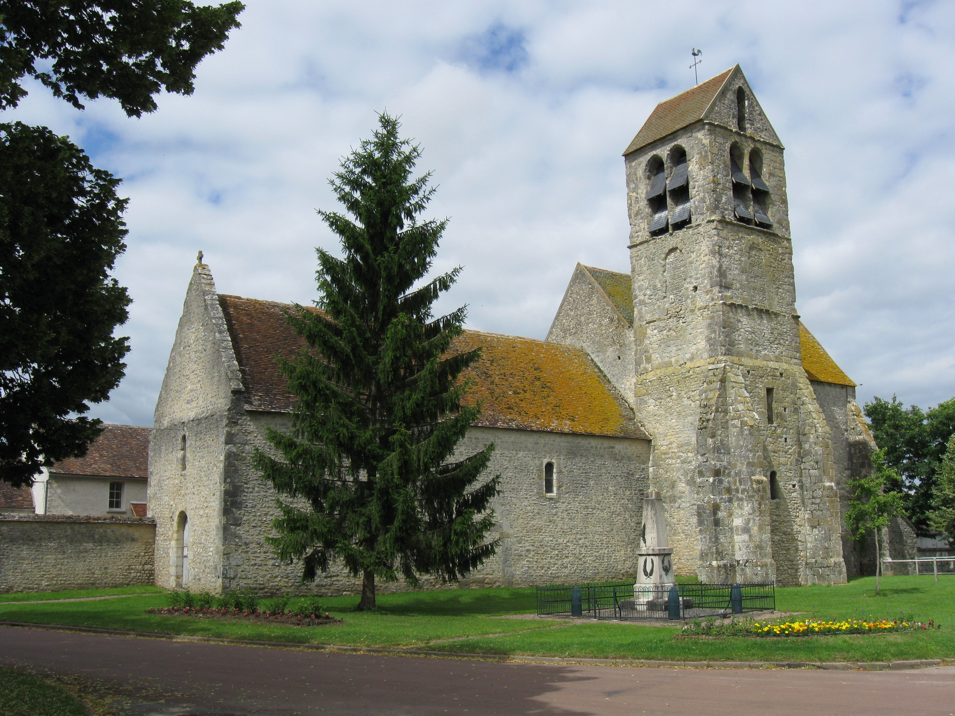 Église catholique Saint-Denis. (Rumont, département de la Seine et Marne, région Île-de-France).